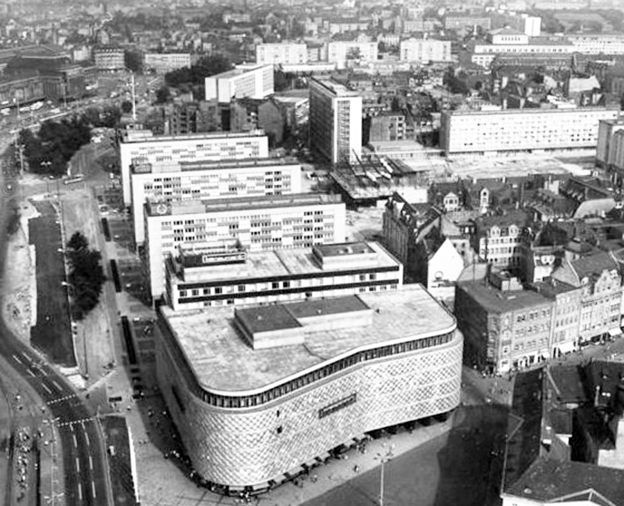 Leipzig, Brühl, "Konsument"-Warenhaus Zentralbild Gahlbeck 31.7.69 Leipzig: Blick aus der Vogelperspektive auf die Leipziger Innenstadt mit dem "konsument"-Warenhaus, Wohnbauten an der Richard-Wagner-Straße und dem Gbäude von Interpelz am Brühl. ZLB-L 241-69 Bitte diese Nummer bei der Veröffentlichung angeben